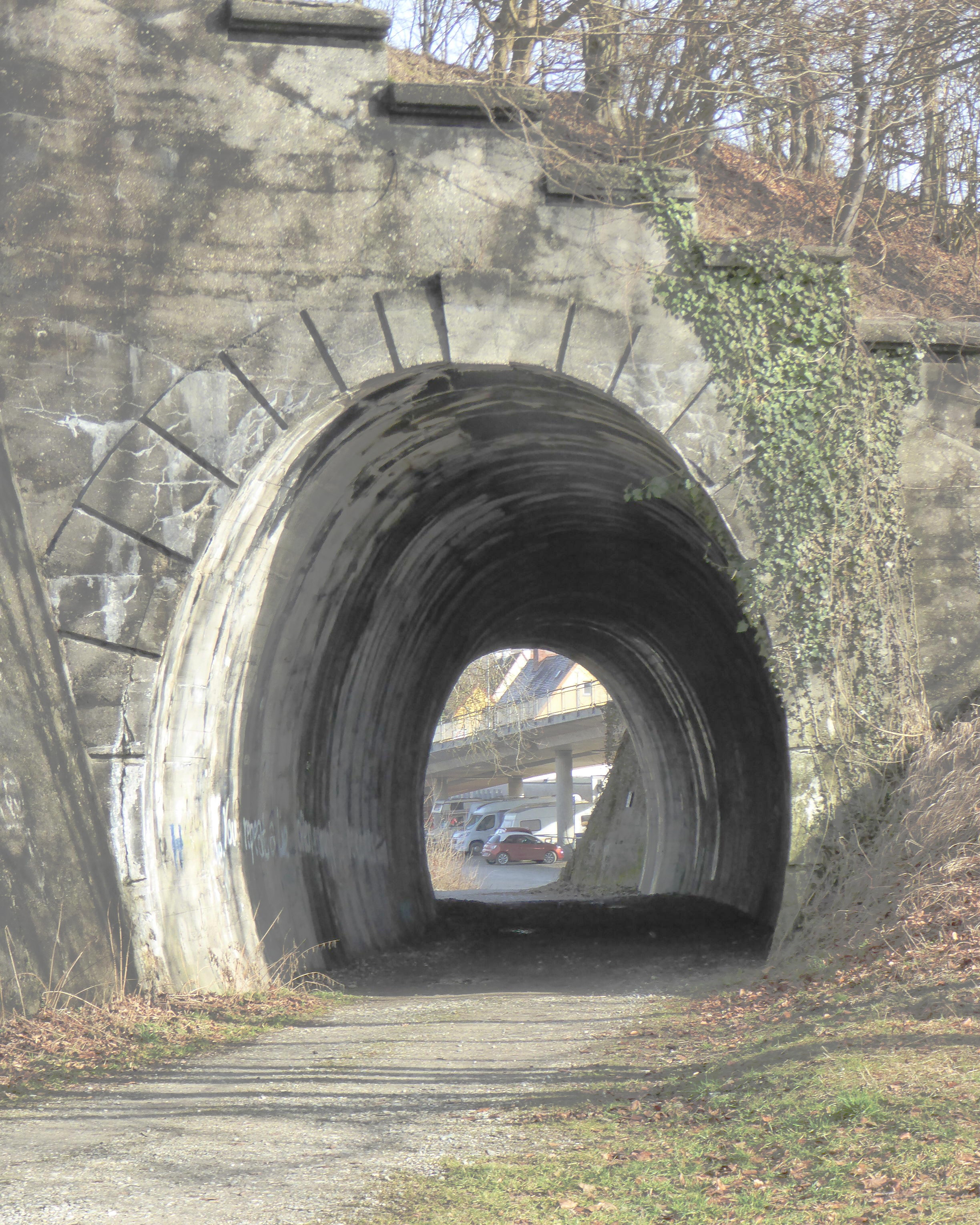 Boarisch: 's friarane Bahntunell unta da Minchna Strass z' Wassabuag am Inn.